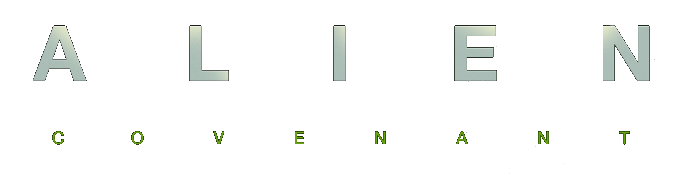 Logo du film Alien: Covenant réalisé par Ridley Scott, sortie en 2017.